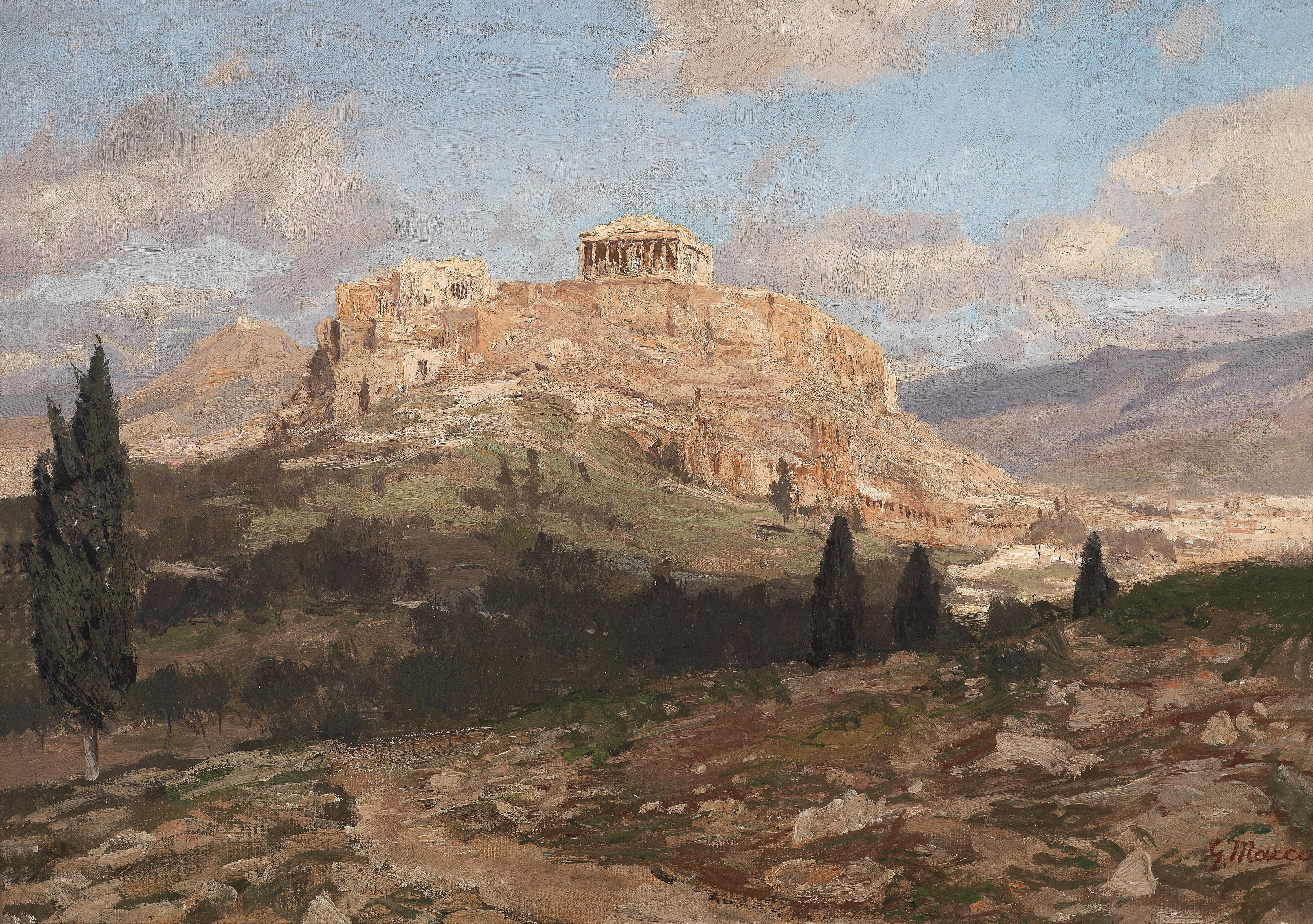 Blick auf die Akropolis, signiert G. Macco, Öl auf Leinwand